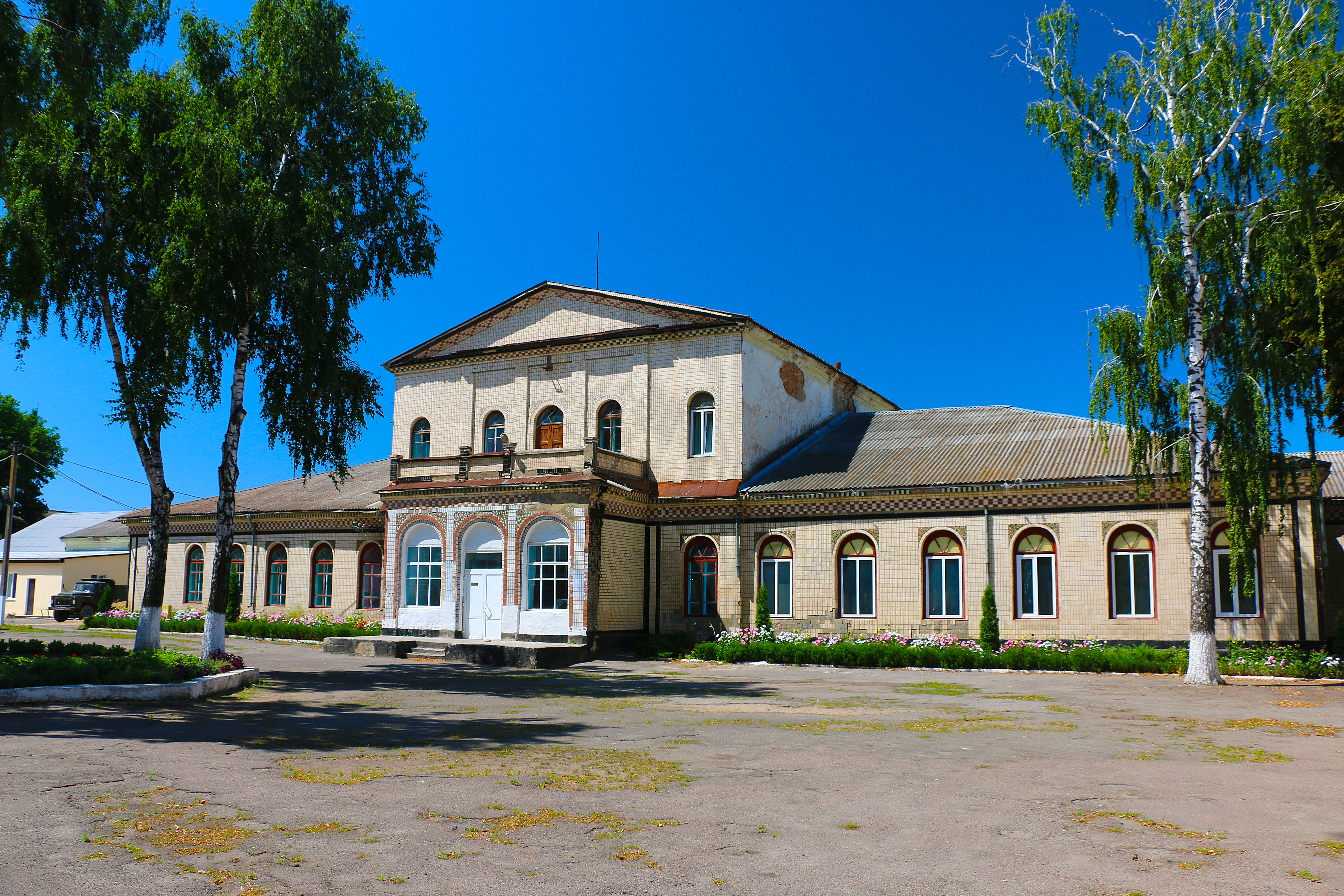 Палац, Дашів, вул. 40-річчя Жовтня,2